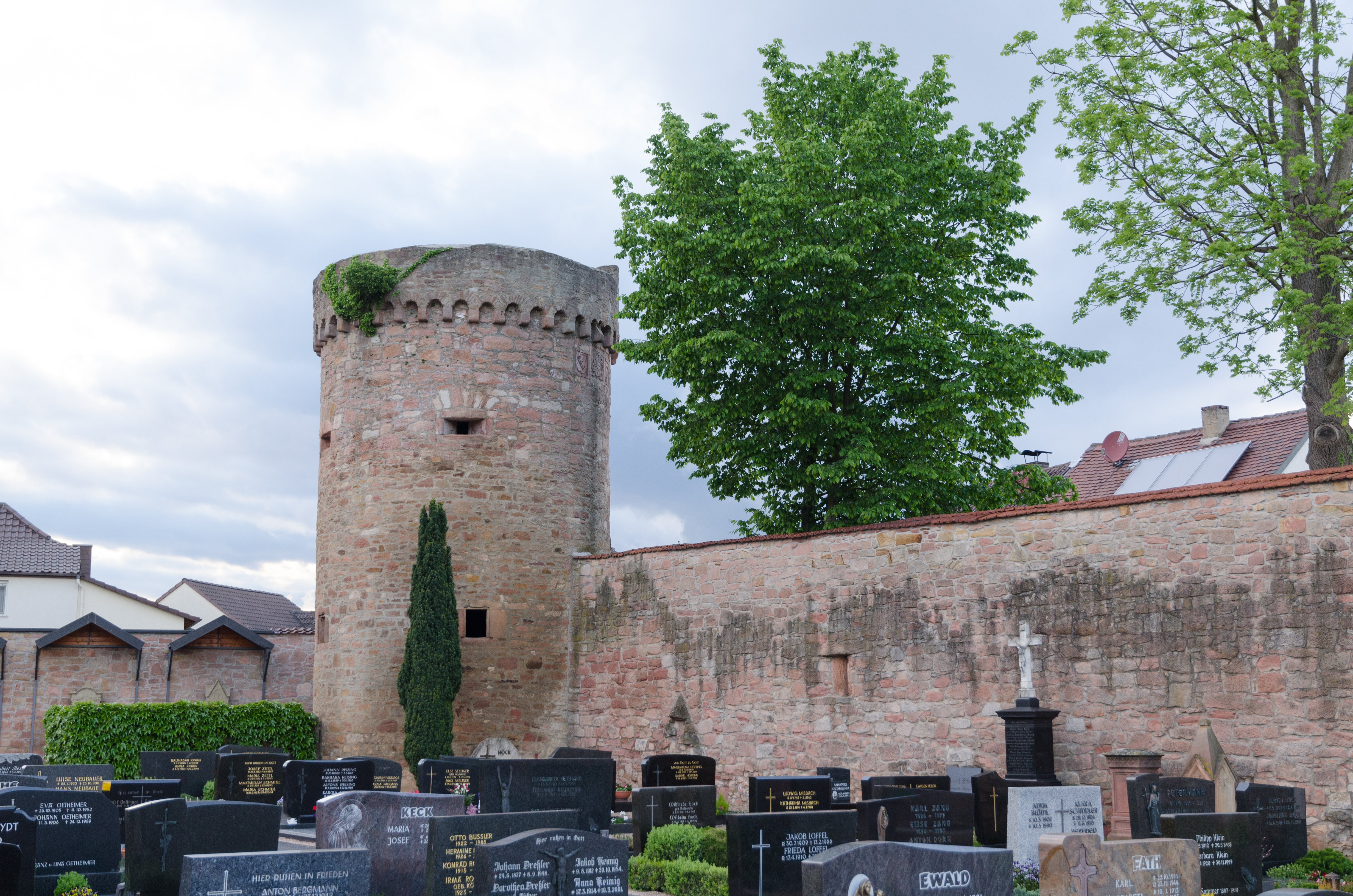 Großostheim, Stumpfer Turm